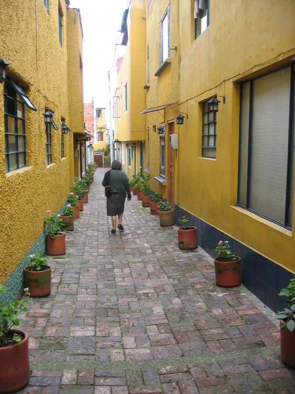 Usaquen - Bogota. 2005.